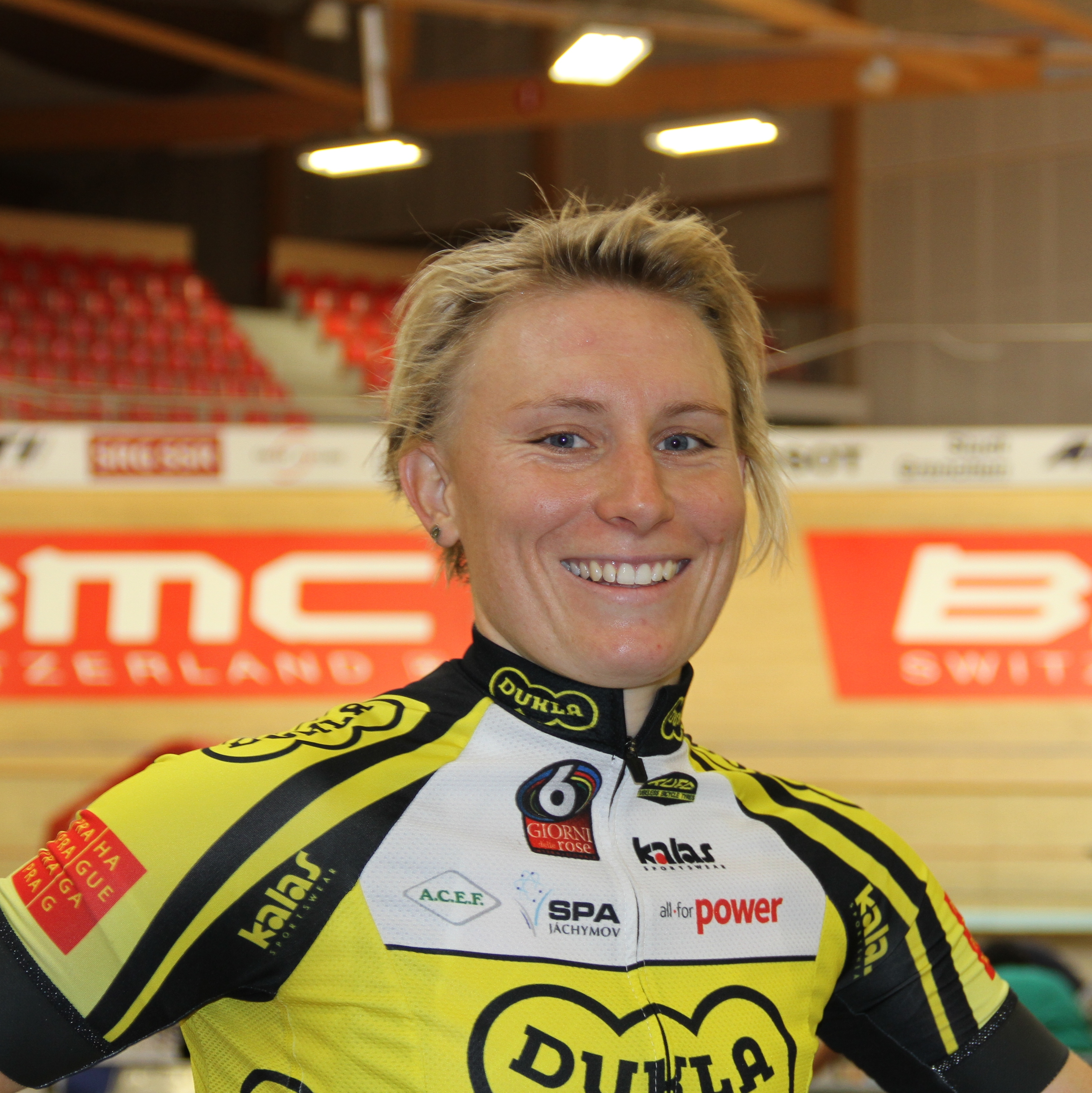 Jarmila Machačová, tschechische Radsportlerin The making of this document was supported by the Community-Budget of Wikimedia Germany.